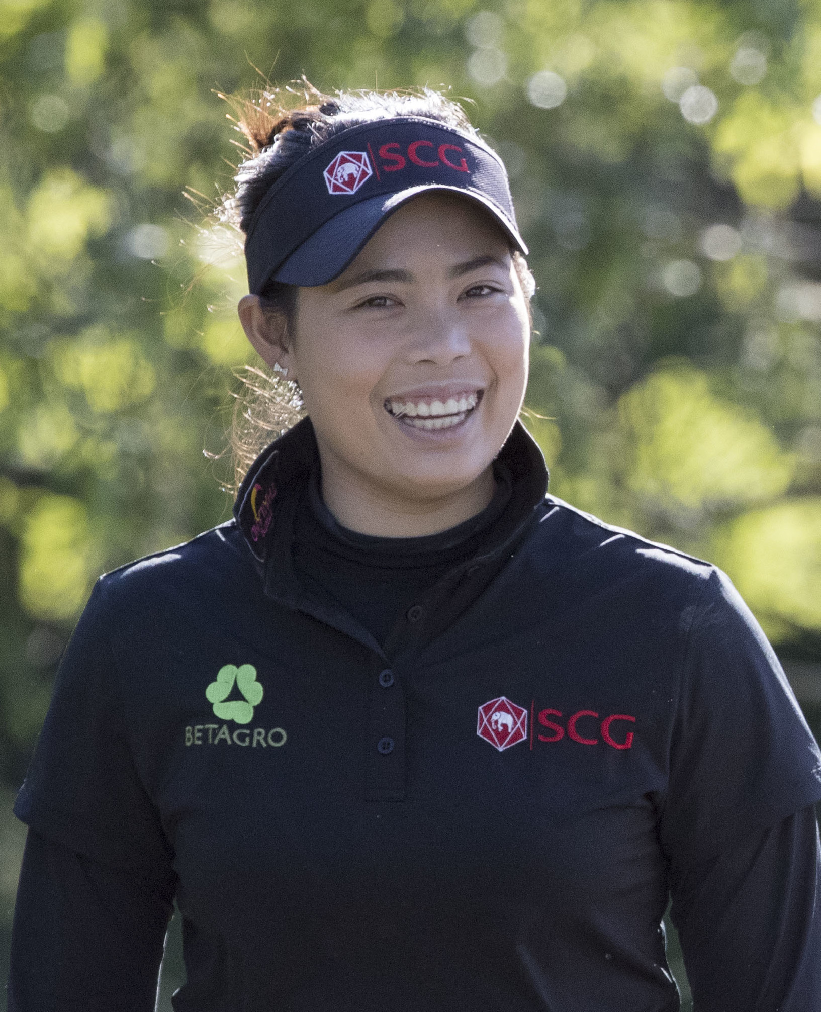 LPGA Kingsmill 2017